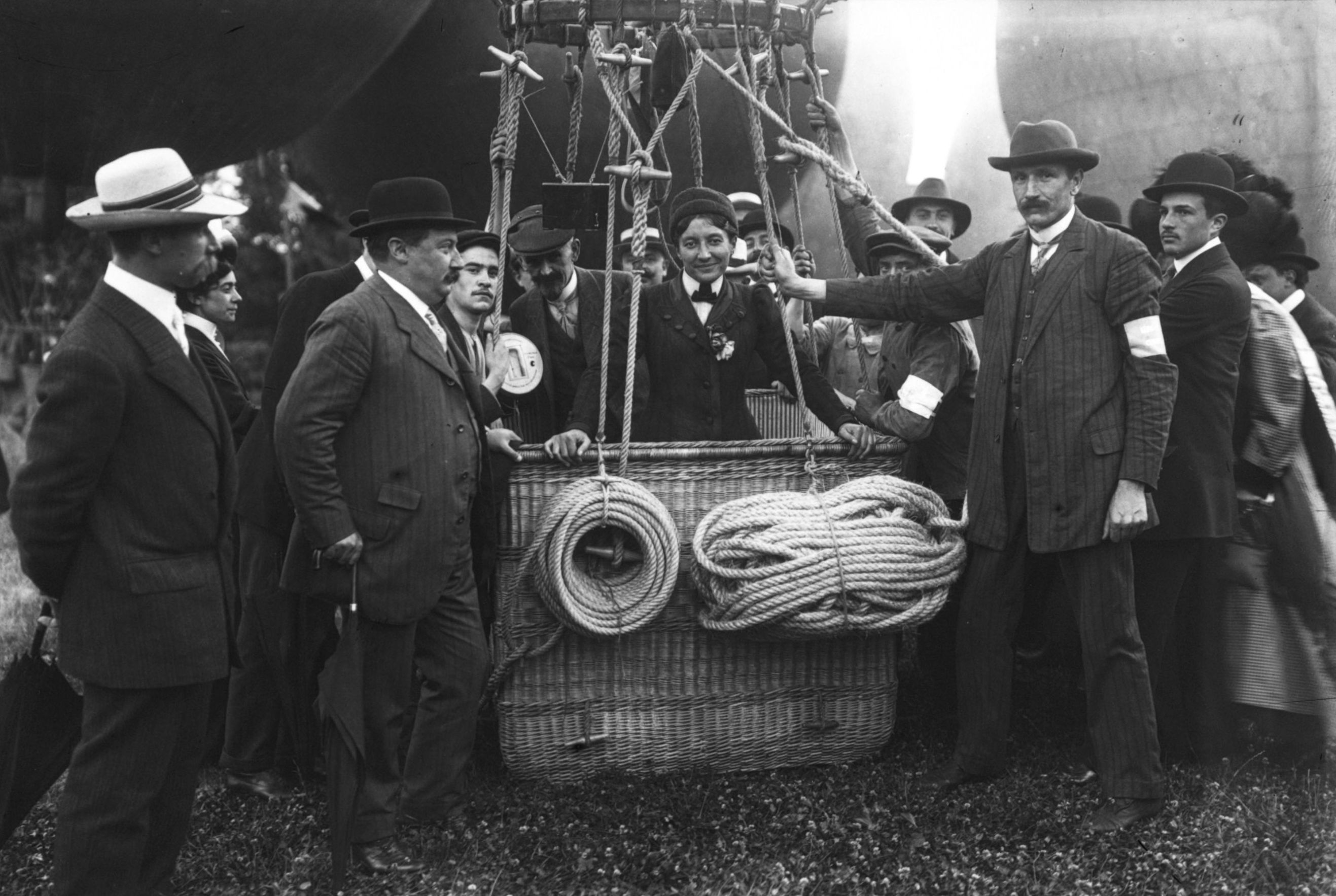 Grand prix de l'Aéro Club [de France, le 26] juin 1910, départ de Mlle Marvingt sur La Lorraine [aéronaute dans la nacelle d'un ballon, à l'hippodrome de Longchamp.